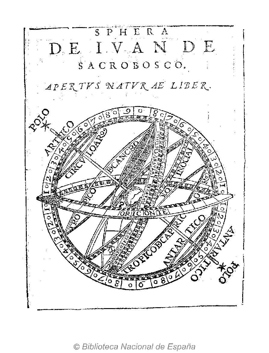 Título: Sphera del vniuerso por Don Gines Rocamora y Torrano ... Autor: Rocamora y Torrano, Ginés de (m. 1612) / Johannes de Sacro Bosco - Sphaera mundi - Español Fecha: 1599 Datos de edición: En Madrid, por Iuan de Herrera (fl. 1599-1614)